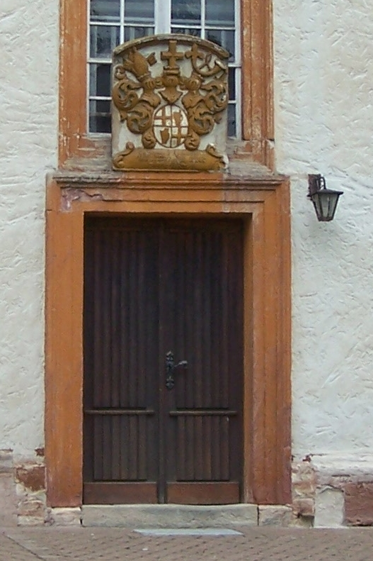 Portal und Wappenstein an der Kirche von Empfertshausen. Das Wappen verweist auf Fürstabt Konstantin von Buttlar.